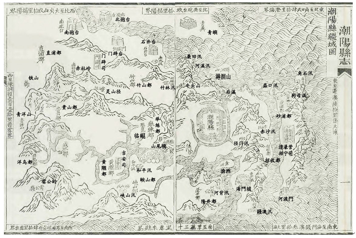 根据清光绪《潮阳县志》疆域图制作而成。